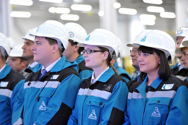 Рабочие комплекса нефтехимической промышленности «Тобольск-Полимер».